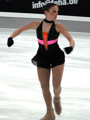 Ana Cecilia Cantu